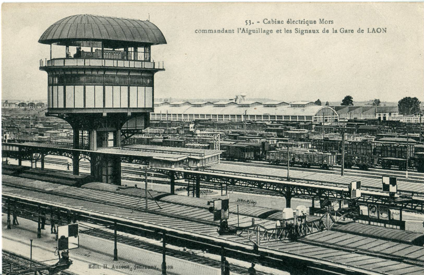 Carte postale ancienne éditée par Auroux, N°53 Cabine électrique Mors commandant l'aiguillage et les signaux de la Gare de Laon.